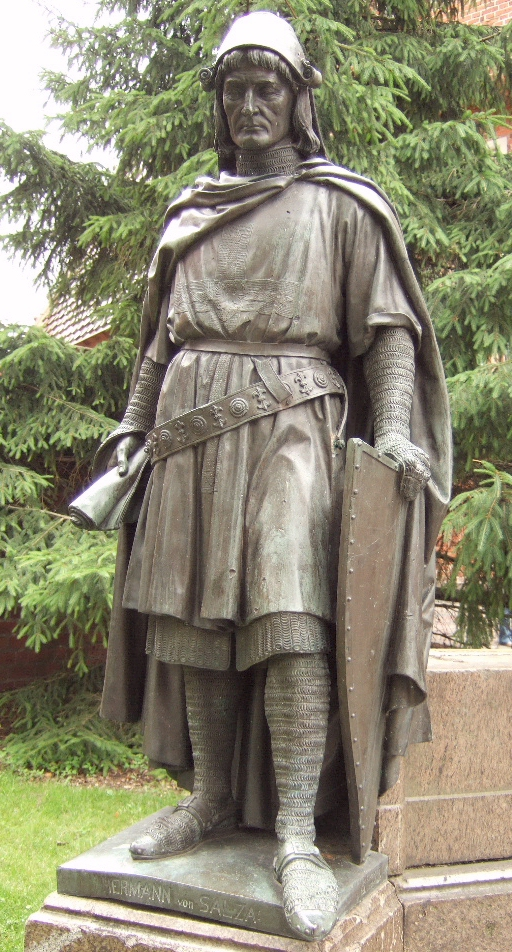 Hermann von Salza - 4. Hochmeister des Deutschen Ordens von 1210 bis 1239 - Bronzeplastik in der Ordensburg Marienburg